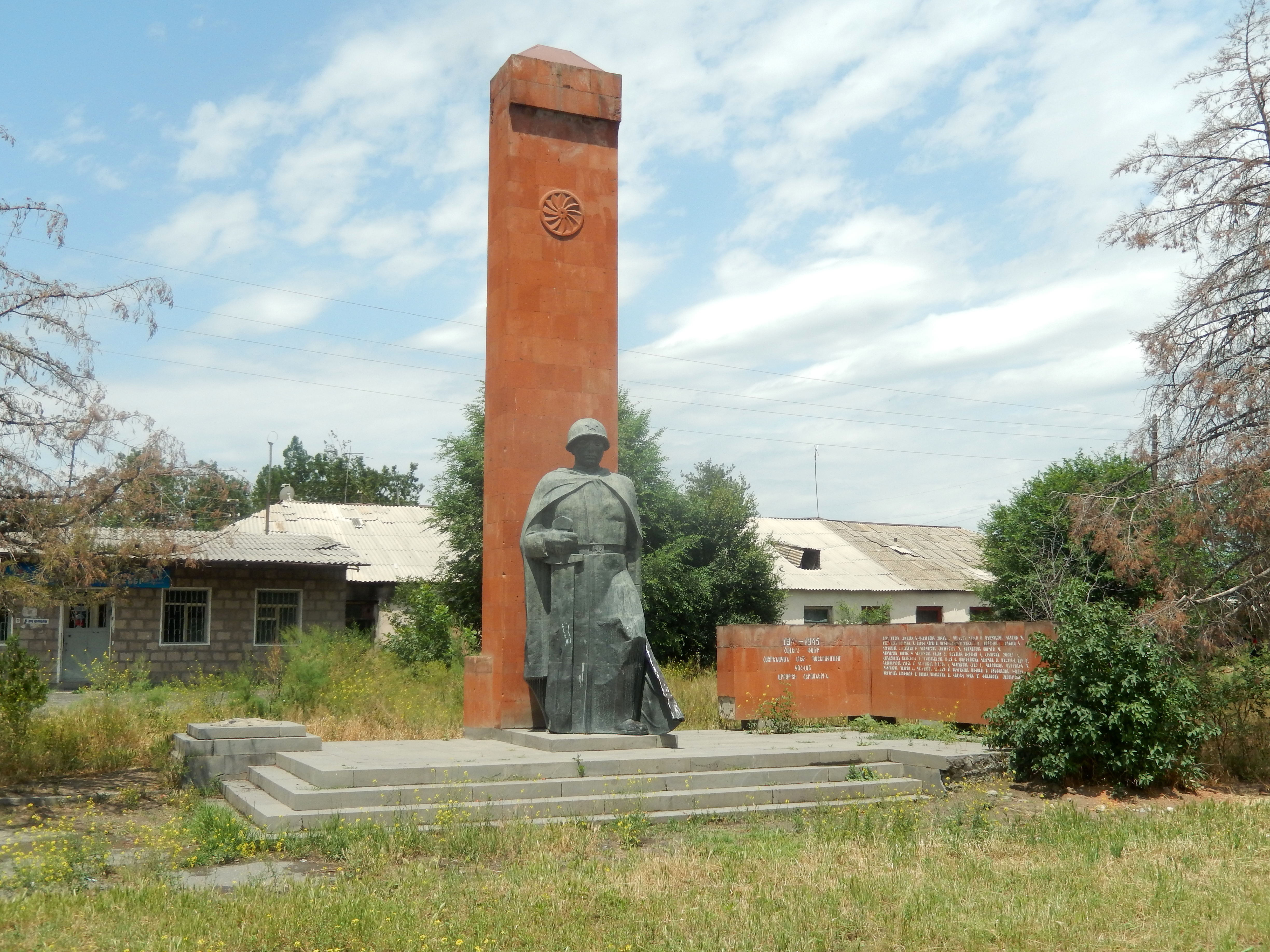 WW2 Monument Arbat, Ararat, sculptor- V. Petrossian, architect- Z. Terteryan 17/